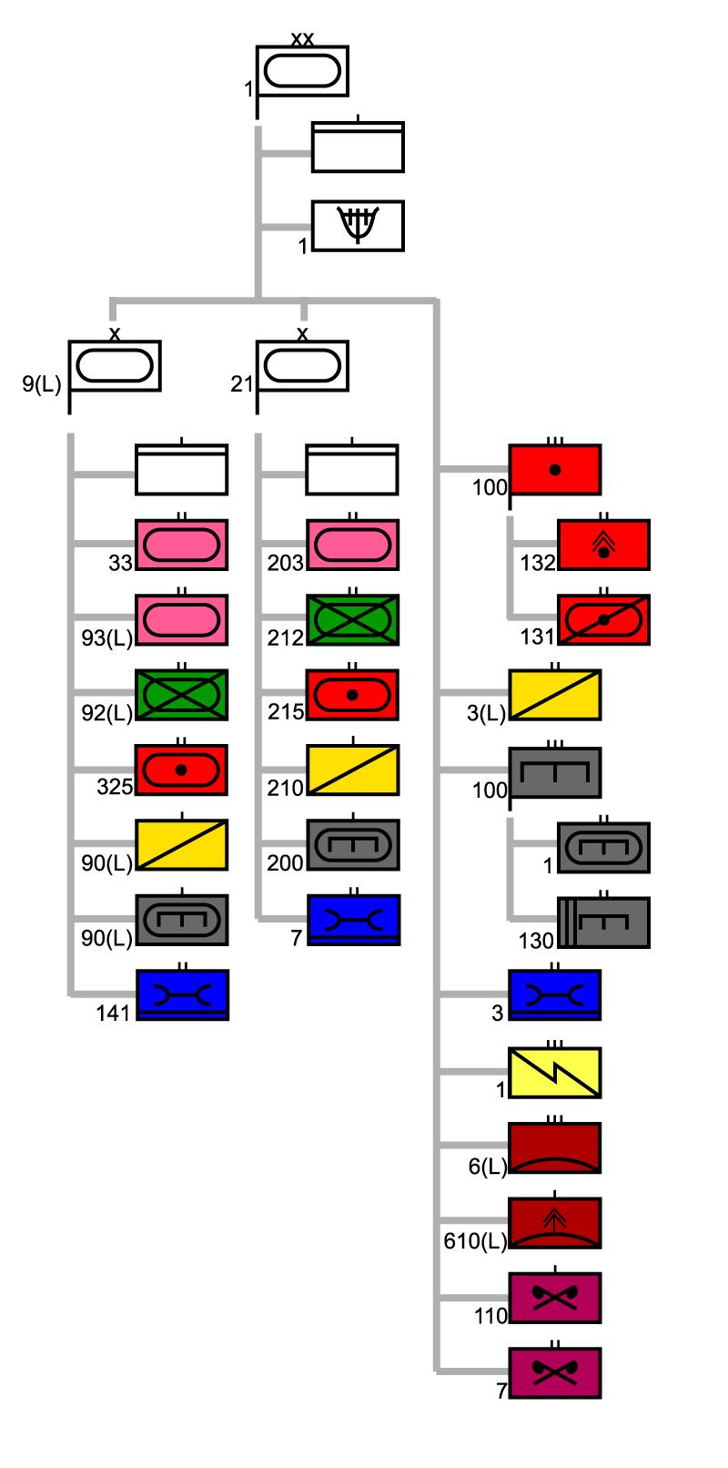 Gliederung 1. Panzerdivision im deutschen Heeres.